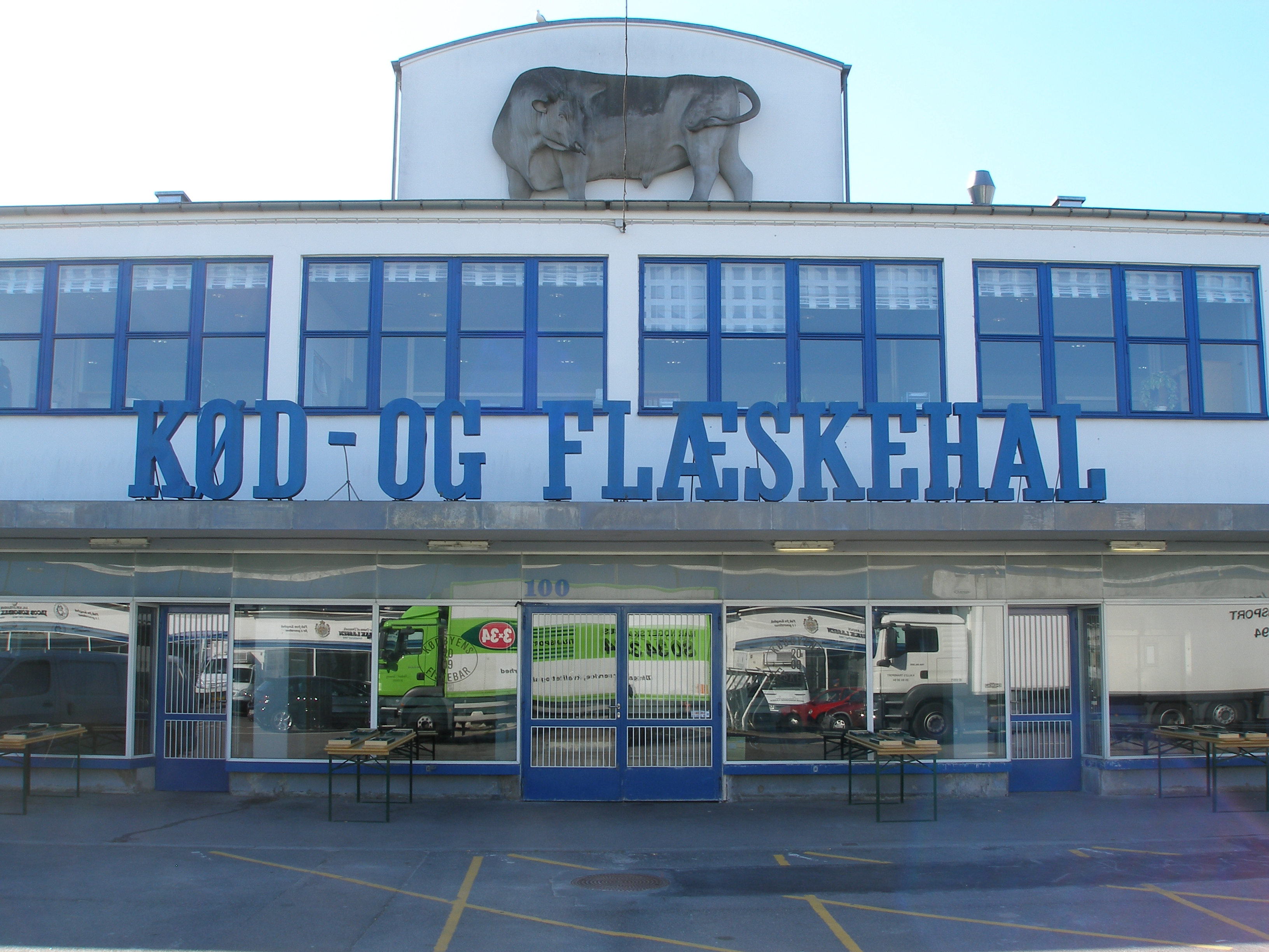 Flæskehallen (Kød- og flæskehal), Flæsketorvet, Kødbyen, hovedindgang